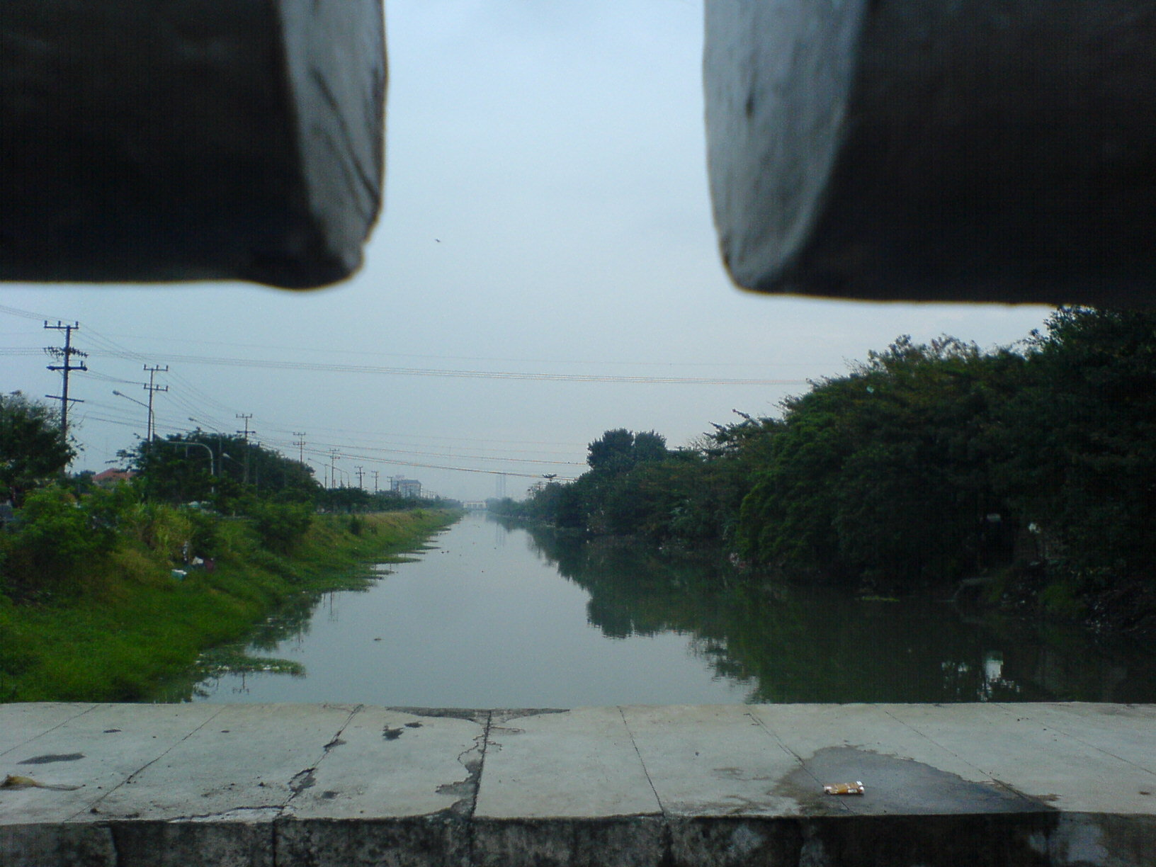 jagir river